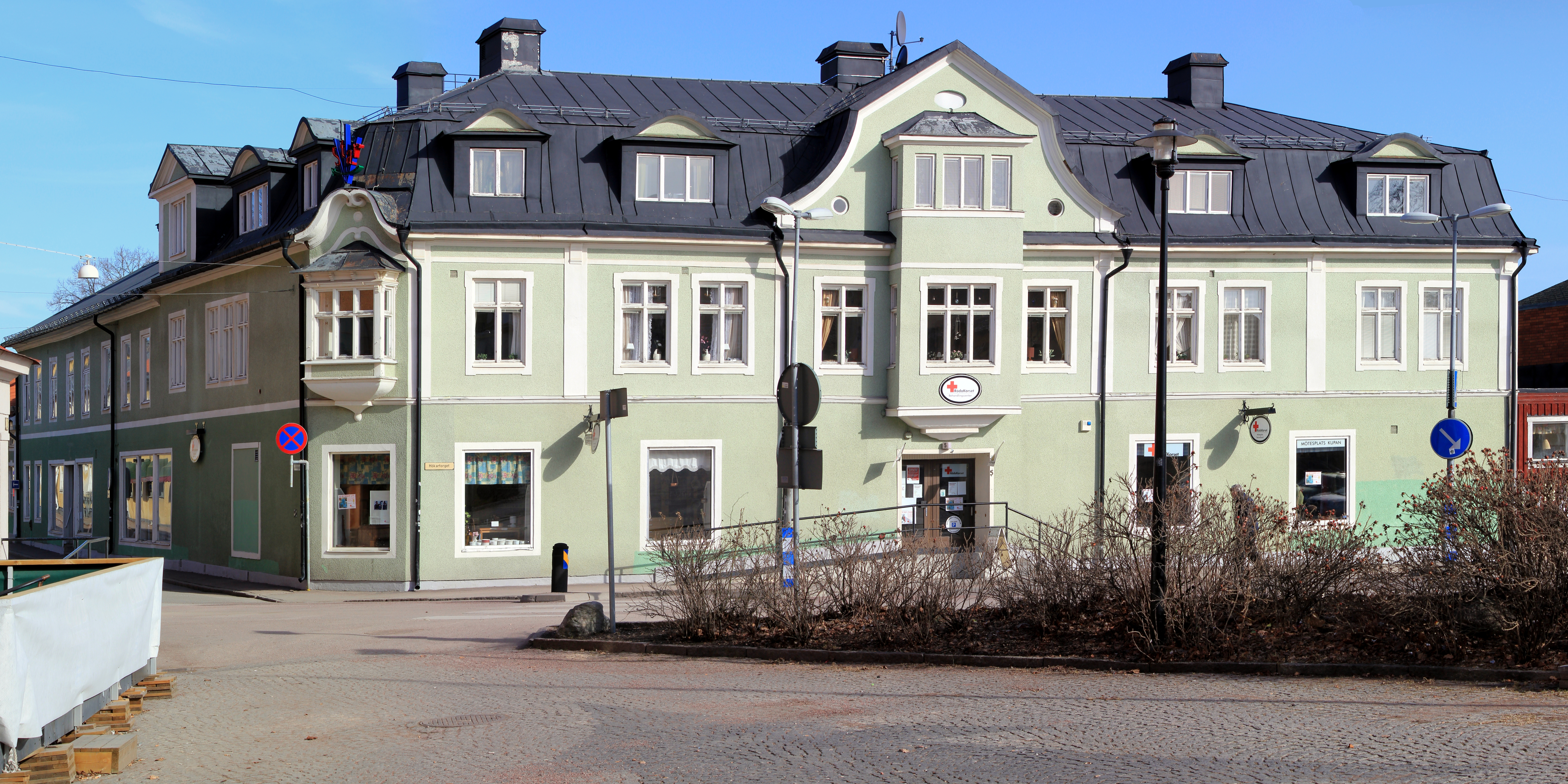 Gamla järnhandeln i Hedemora, Dalarnas län, Sverige. Ritad av Carl Johan Perne.